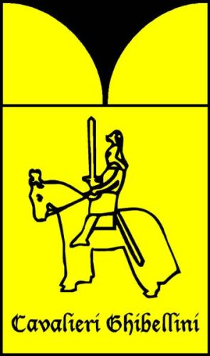 è lo stemma del Sacer Ordo Goliardicus de li Cavalieri Ghibellini